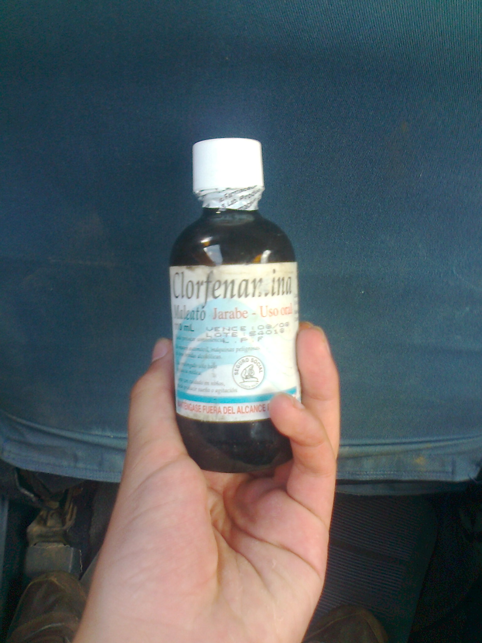 Un frasco de Clorfenamina.